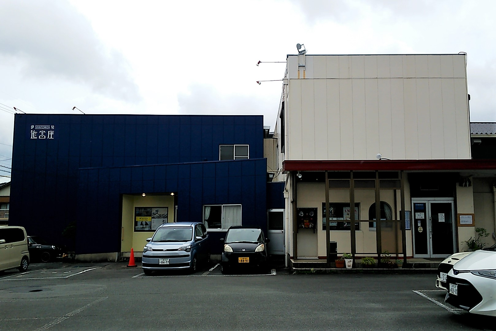 三重県伊勢市の伊勢進富座。